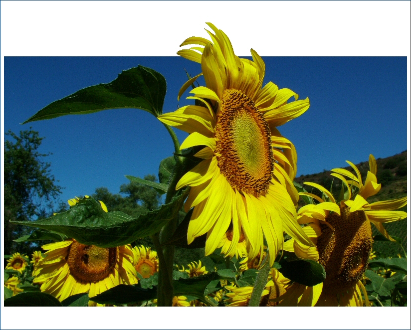 Sonnenblume